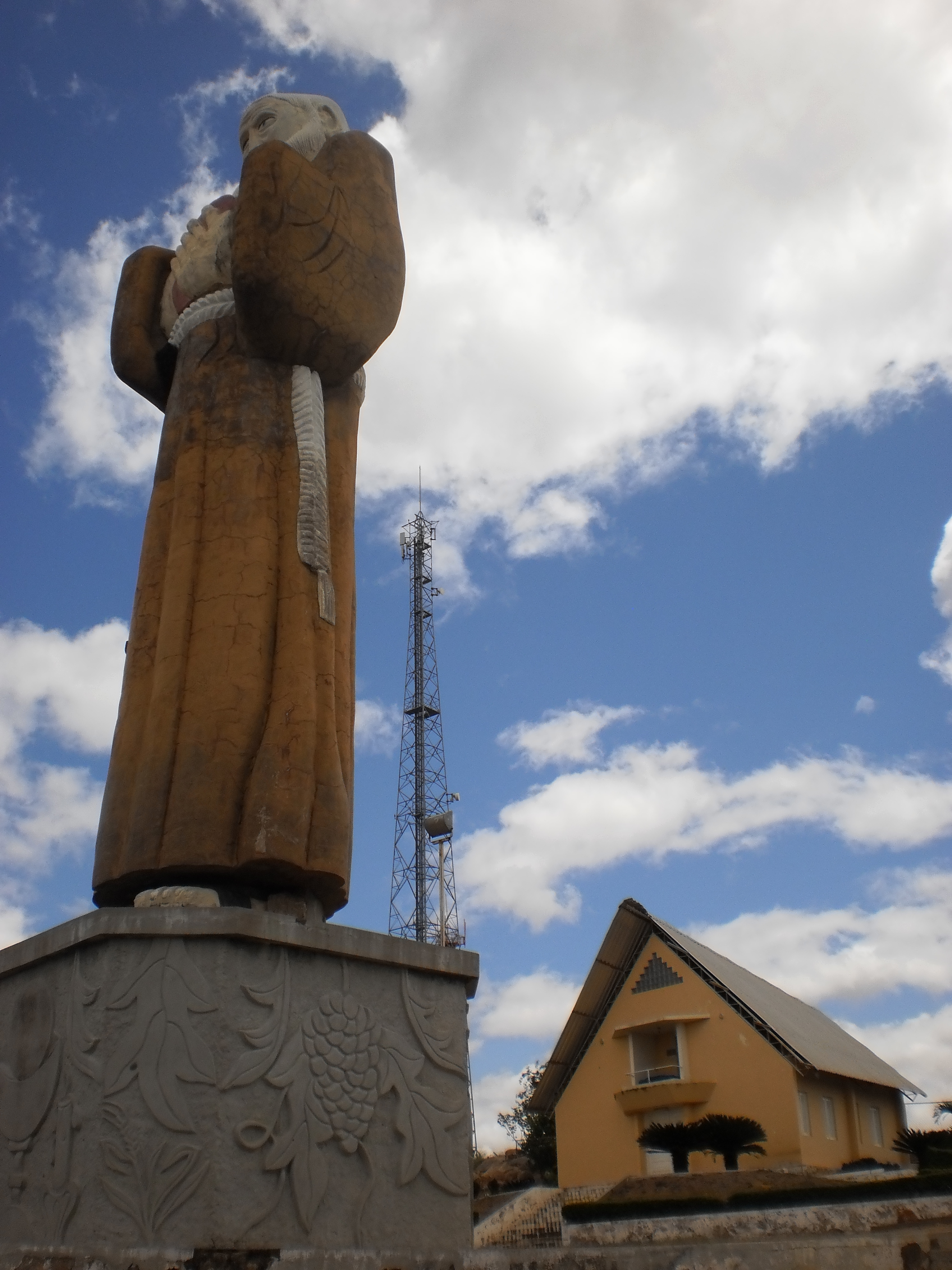 Estátua de Frei Damião, com o Santuário ao fundo - Venha-Ver, Rio Grande do Norte, Brasil.